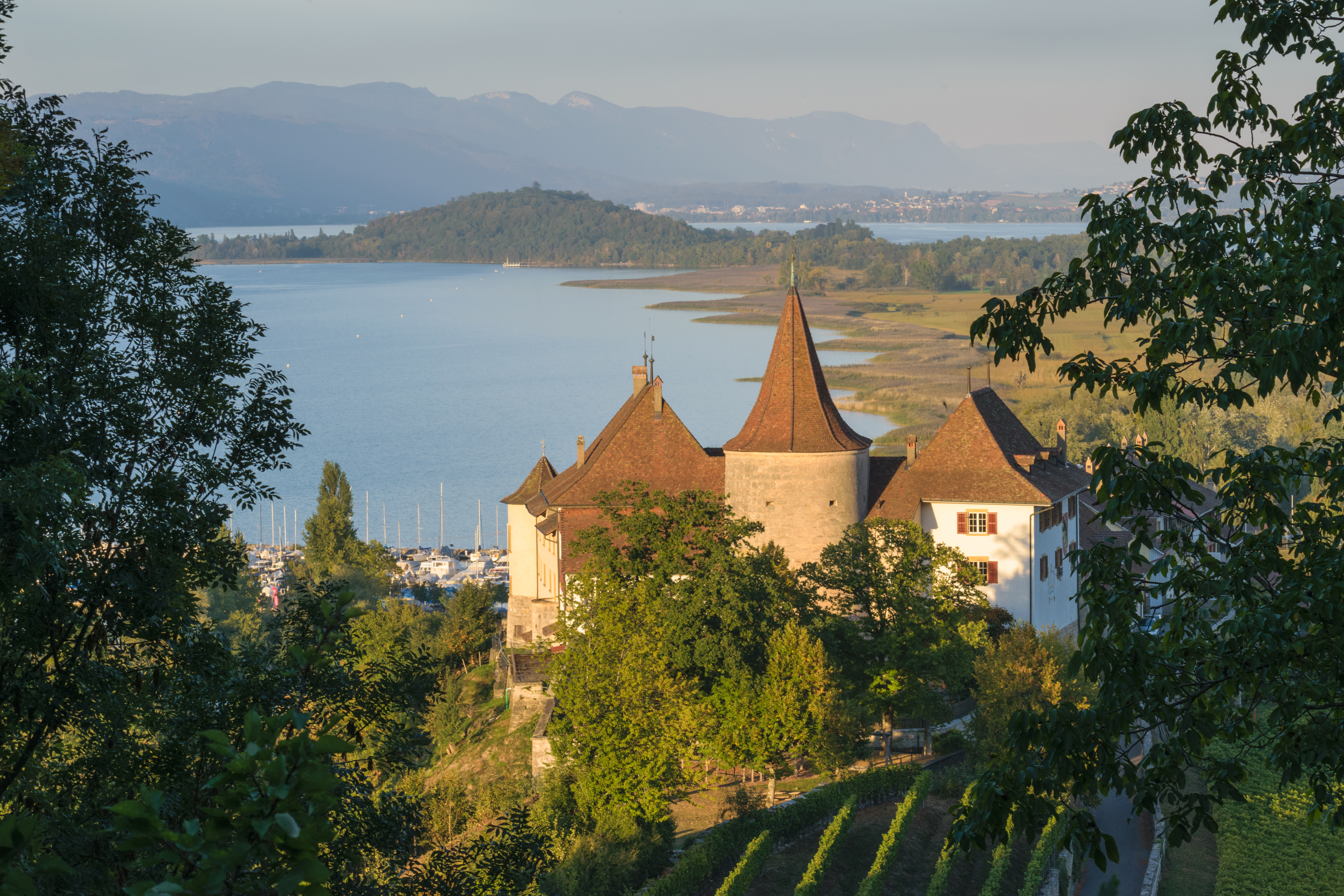 Schloss Erlach, Kanton Bern, Schweiz